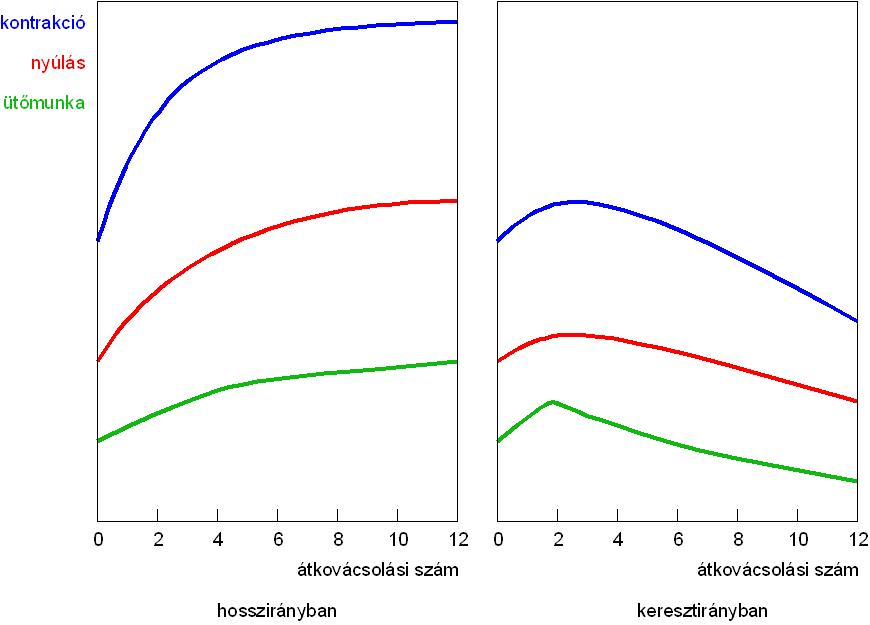 A mechanikai tulajdonságok függése az átkovácsolástól